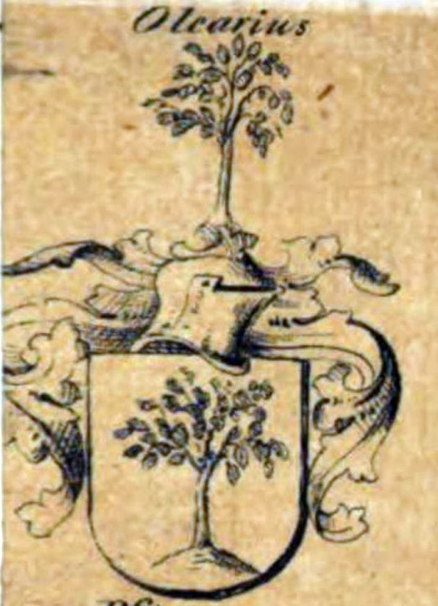 Wappen des Gottfried Olearius, Theol. in Halle um 1634